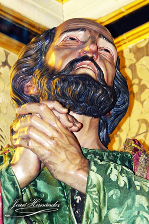 San Pedro Penitente. (1822). Fernando Estévez de Salas (1788-1854). Parroquia Matriz de El Salvador, Santa Cruz de La Palma. Canarias